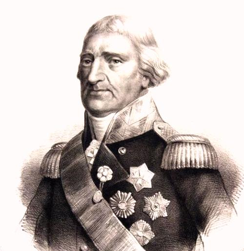 Vice-admiraal Kinsbergen